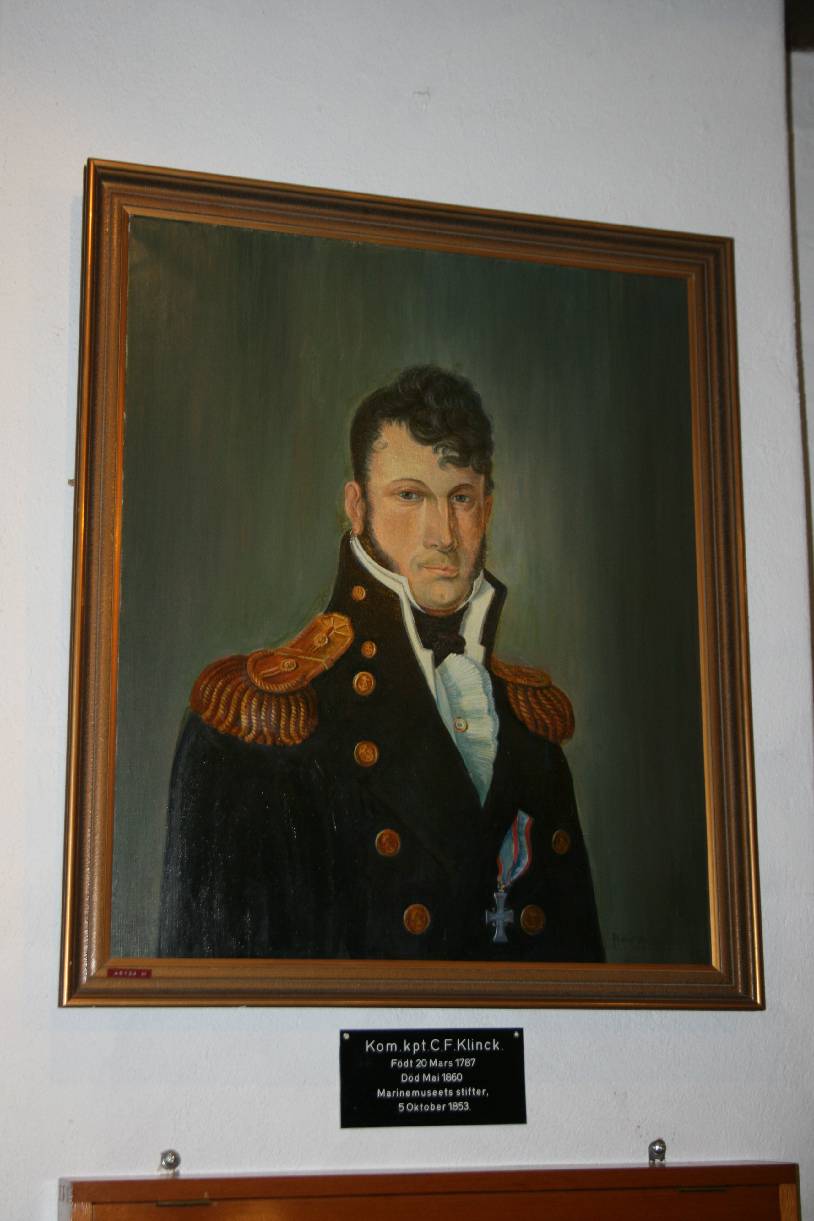 Maleri av Christen Frederik Klinck, utstilt på museet han stiftet.